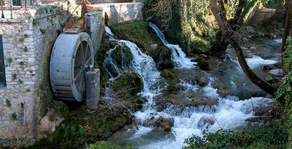 Livadia1